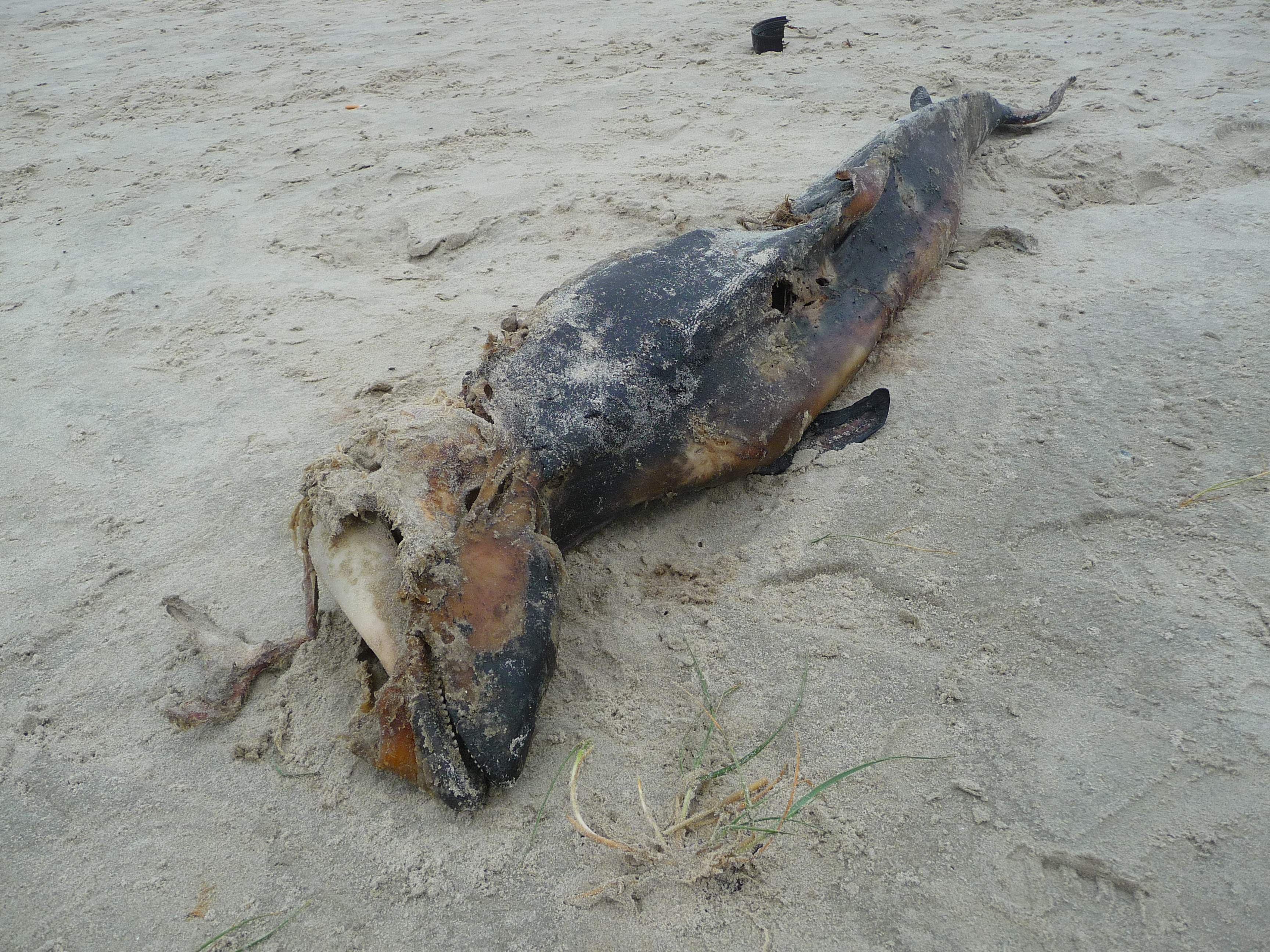 Verwesender Gewöhnlicher Schweinswal (Phocoena phocoena) im Spülsaum der Nordsee auf der Insel Juist, Länge circa 1,40 Meter